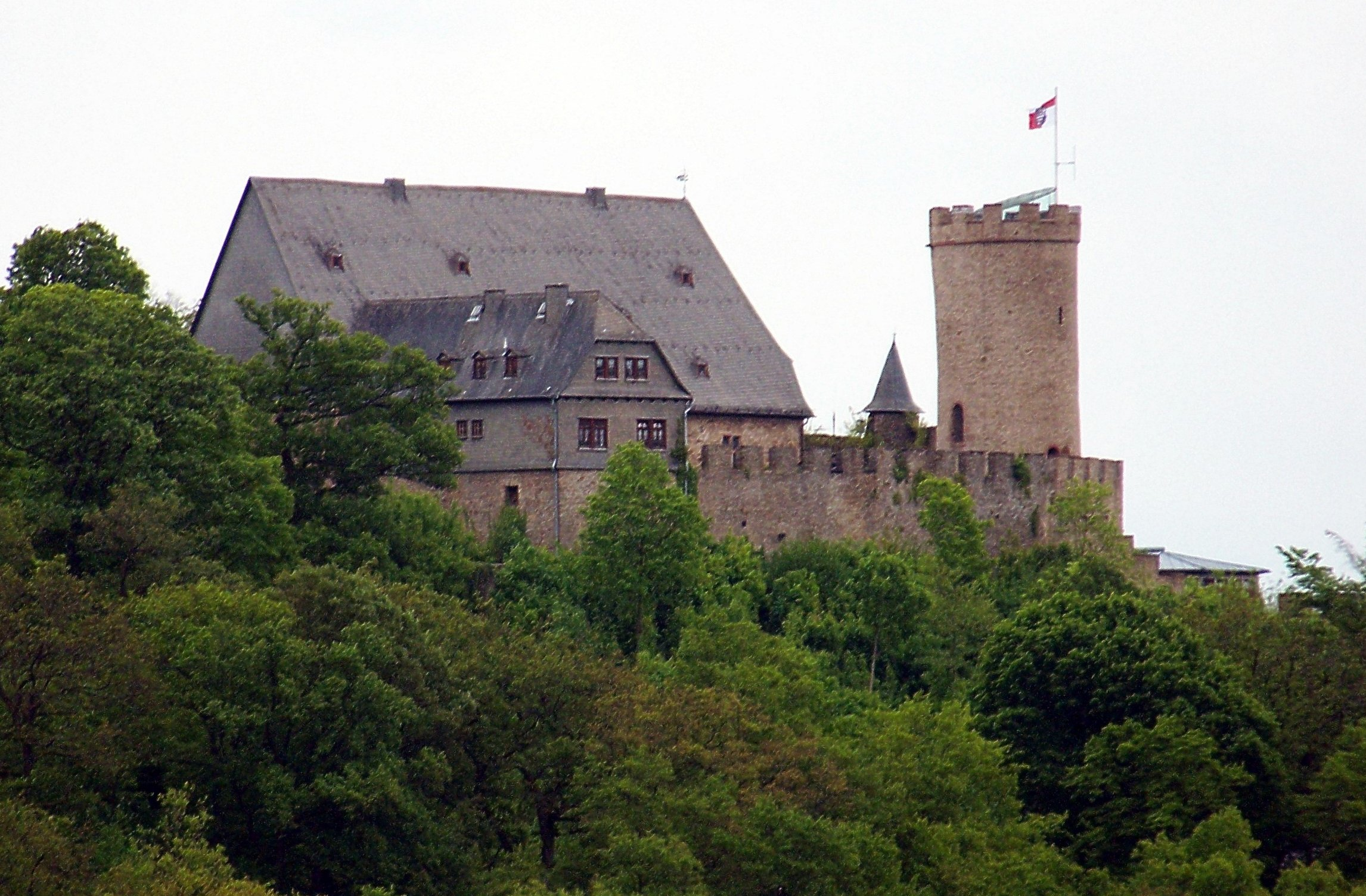 Landgrafenschloss auf dem Schlossberg im hessischen Biedenkopf; Ansicht von Westen